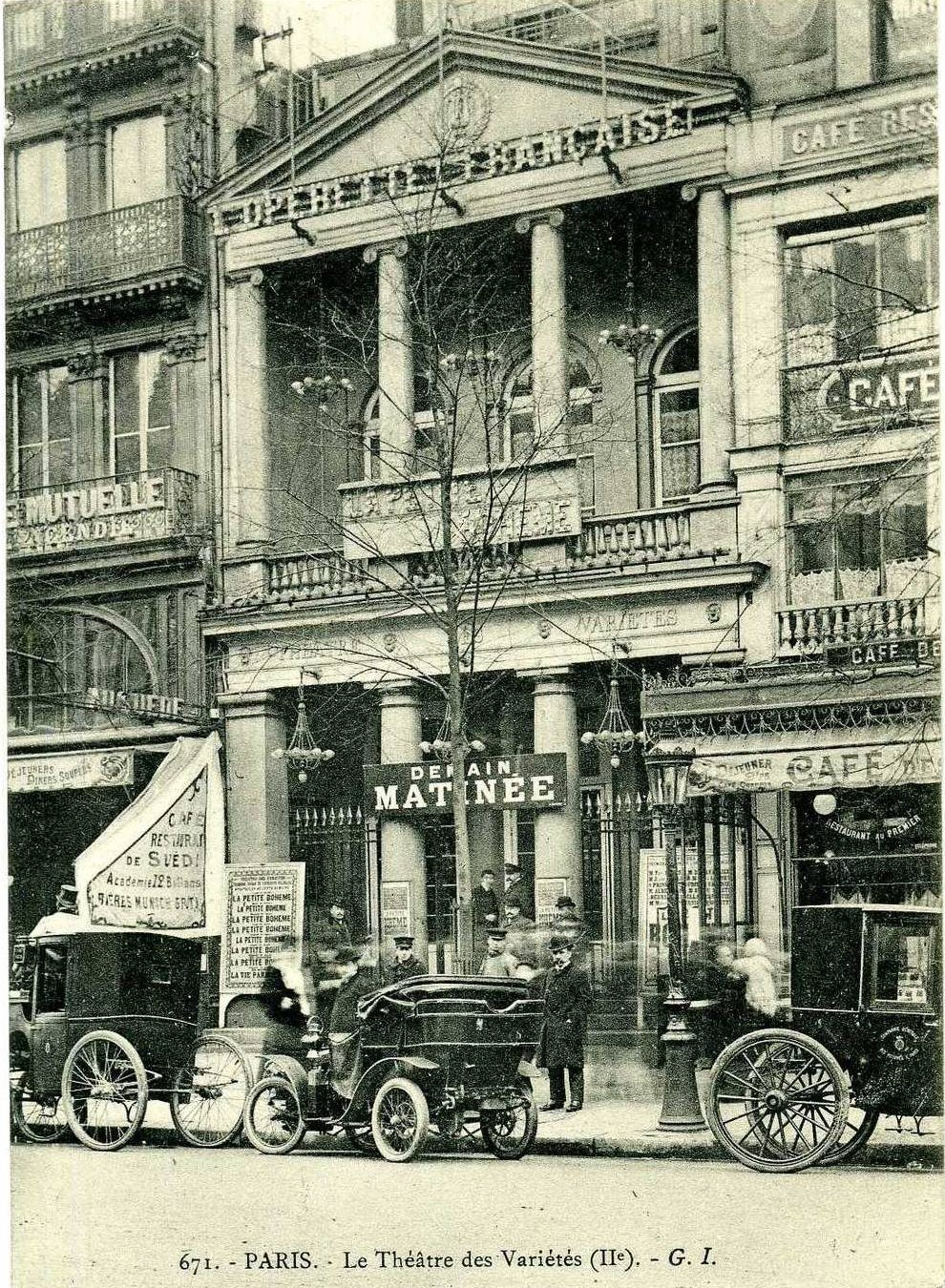 "671. PARIS. Le Théâtre des Variétés (IIe) - G.I."